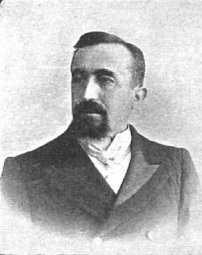 D. Federico Requejo, Subsecretario de Instrucción Pública. Fotografía de Manuel Compañy.